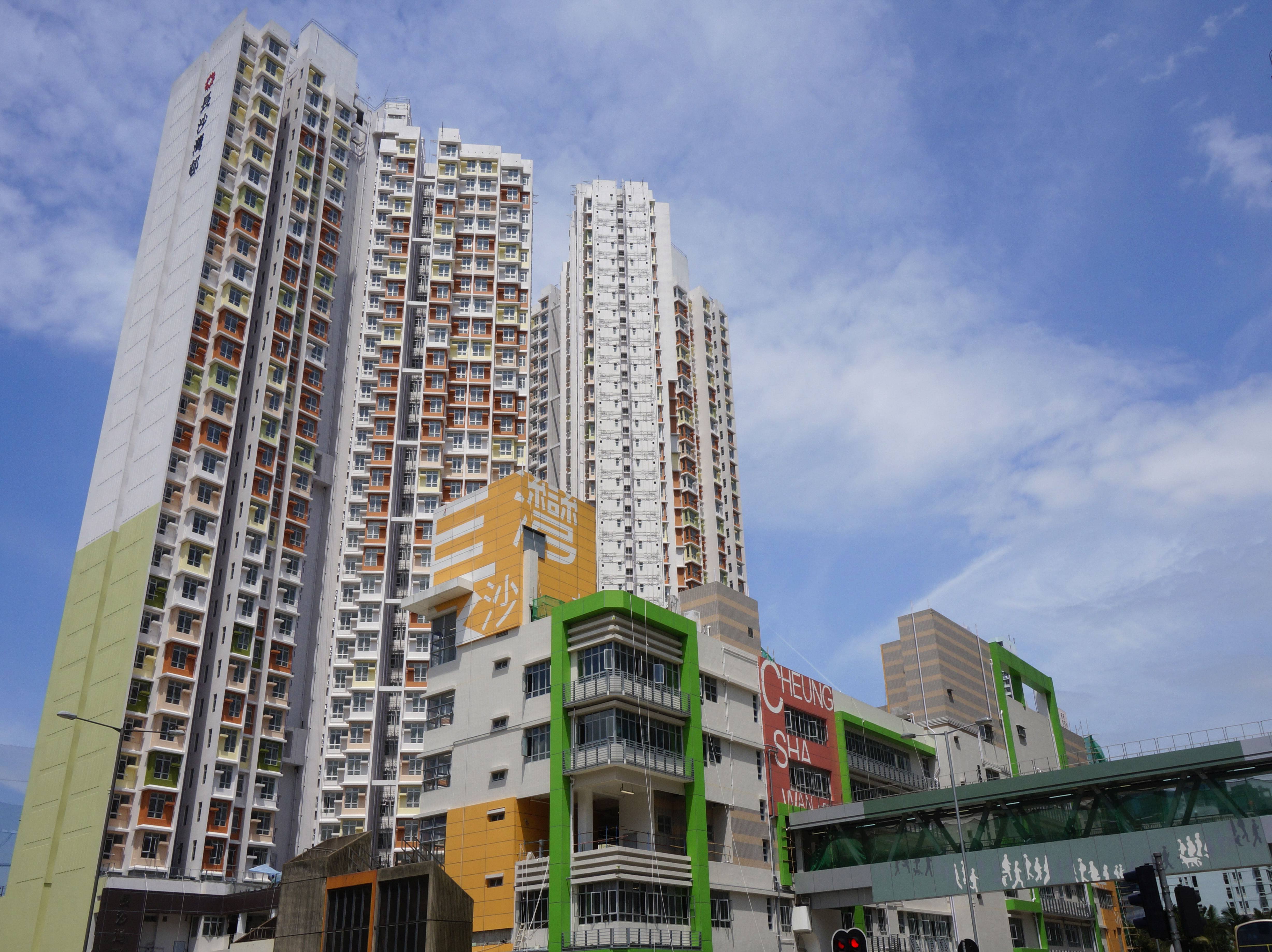 長沙灣邨與邨內社區中心